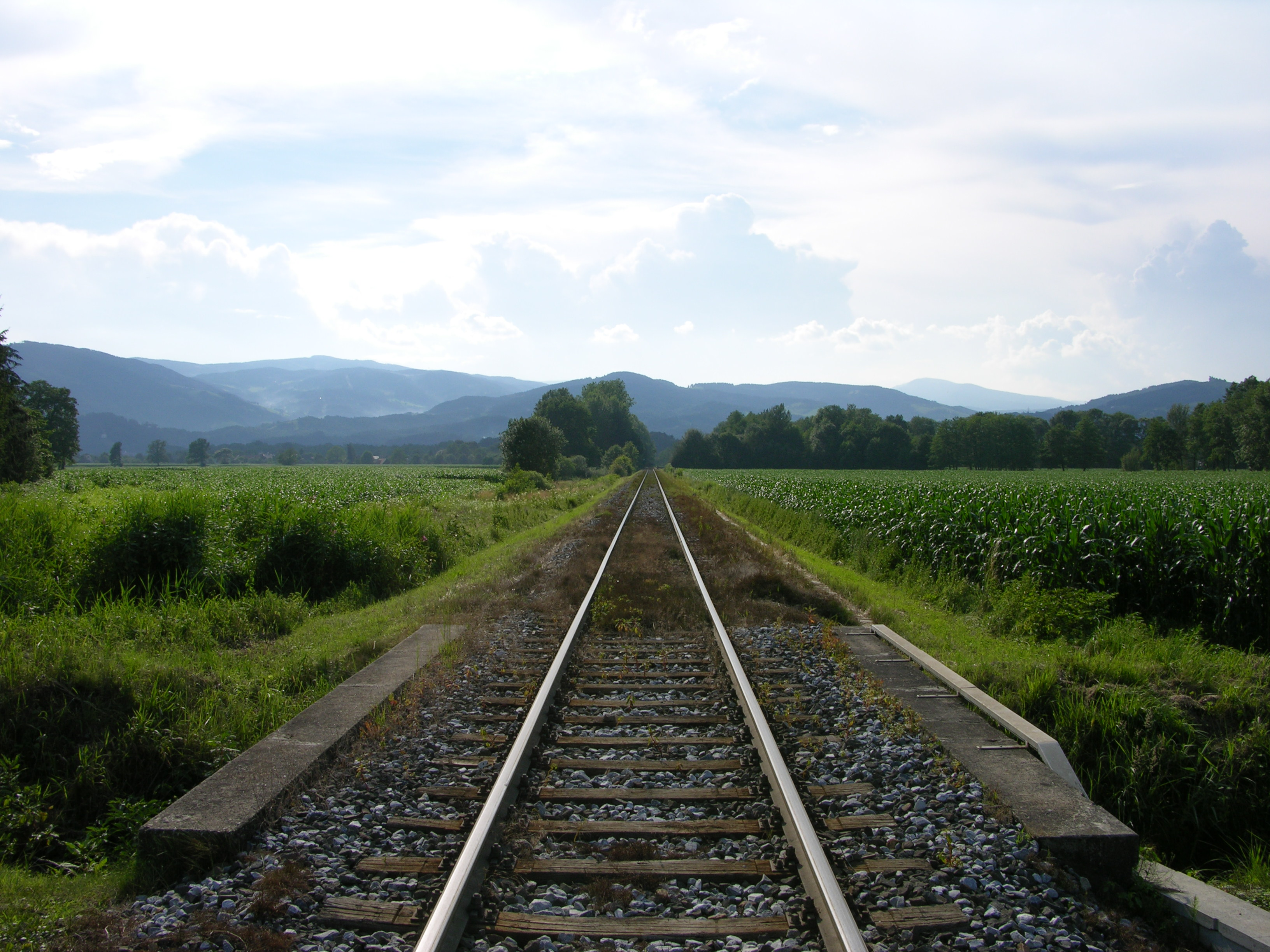 Eisenbahnstrecke bei St.Peter im Sulmtal